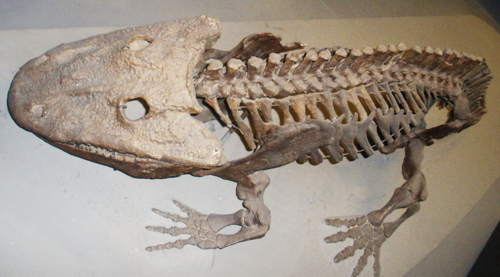 Fossil of Eryops, an extinct amphibian-- Took the photo at Natural History Museum, London